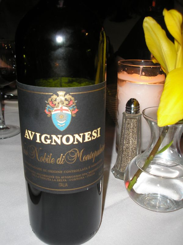 Avignonesi Rosso Vino Nobile di Montepulciano